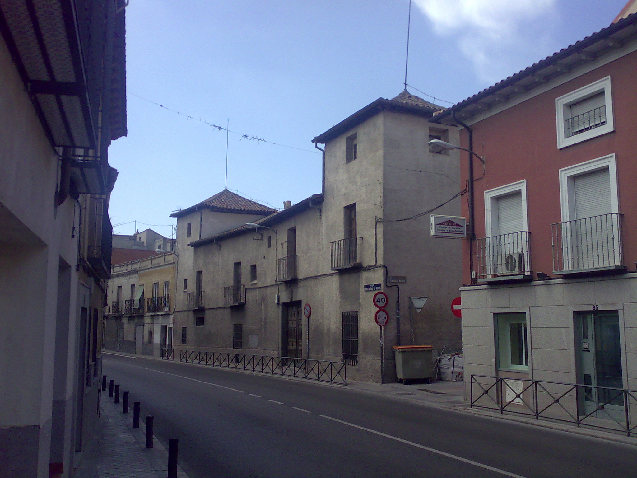 Casa Grande de Fuencarral, Fuencarral, Madrid